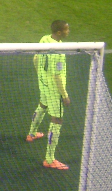 Deyverson